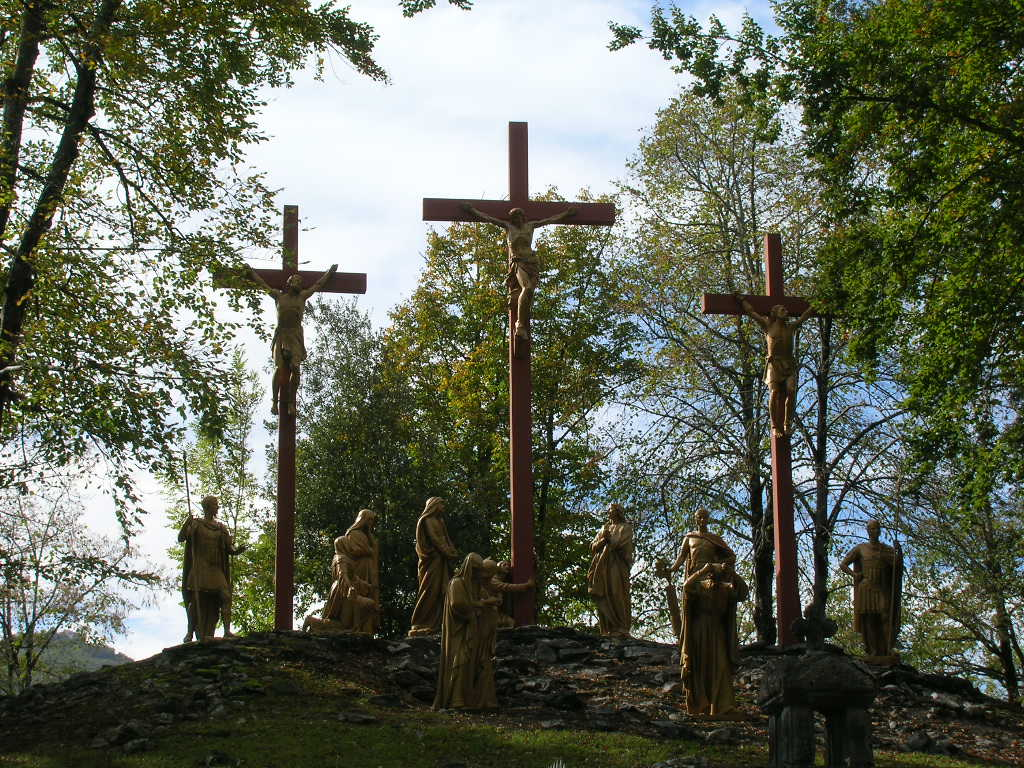 Particolare della XII stazione della Via Crucis di Lourdes